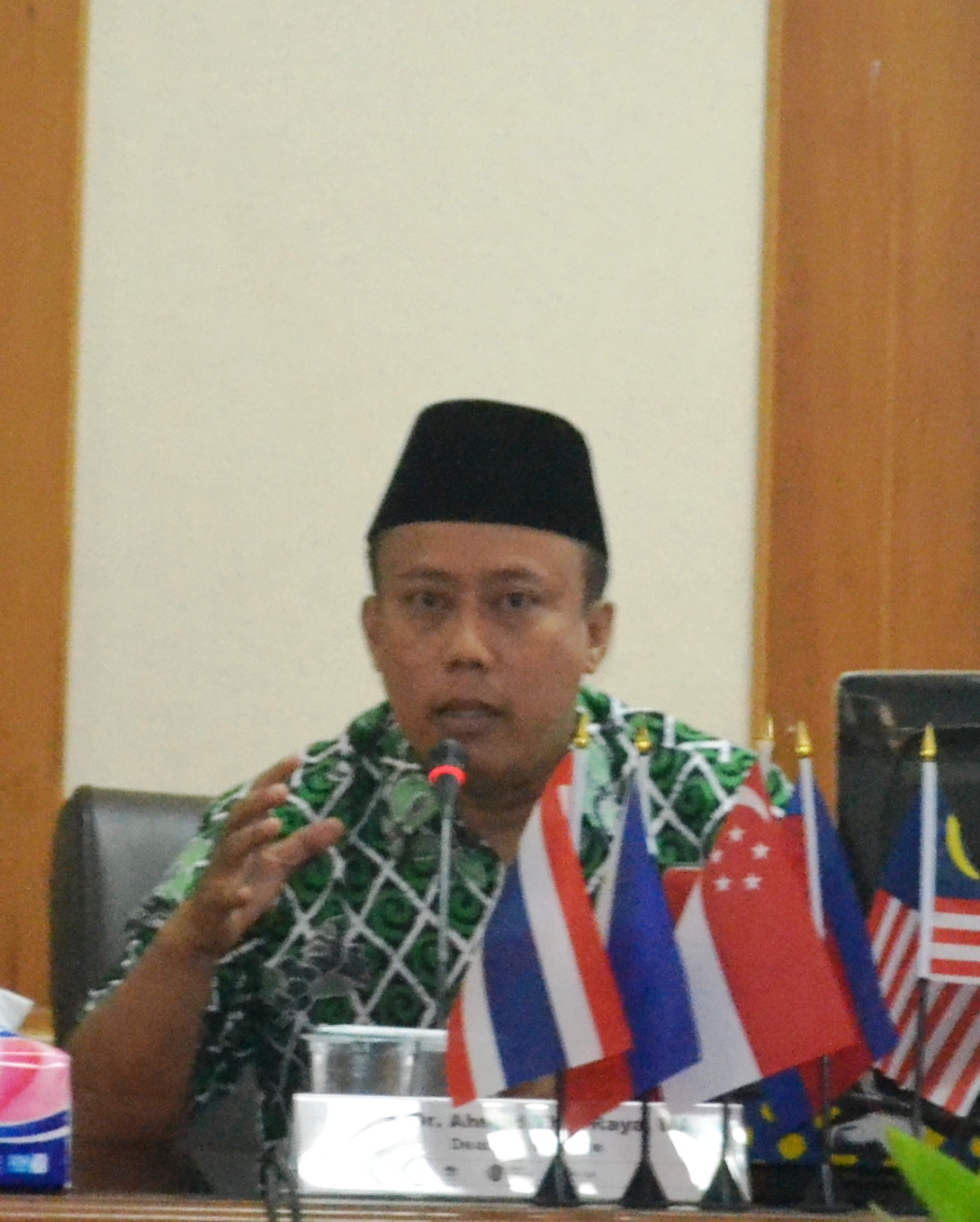 Deni Kurniawan As'ari, Sekretaris Jenderal Asosiasi Guru Madrasah Penulis Indonesia (Agumapi), di FITK Universitas Islam Negeri Syarif Hidayatullah Jakarta.